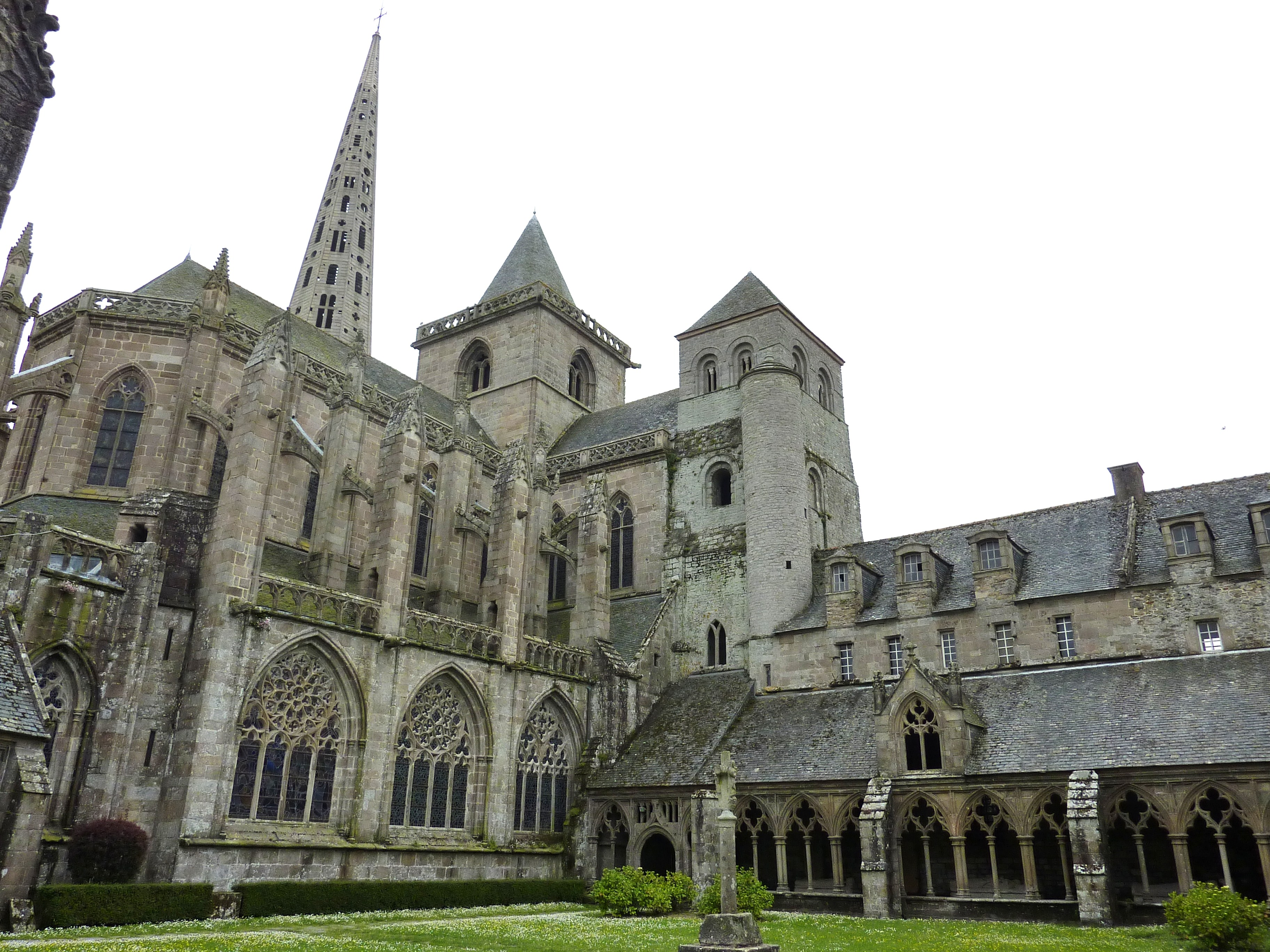 Tréguier : la cathédrale Saint-Tugdual. De gauche à droite: flanc nord du chœur, flèche de la tour des Cloches, tours du Sanctus et Hastings, galerie ouest du cloître.